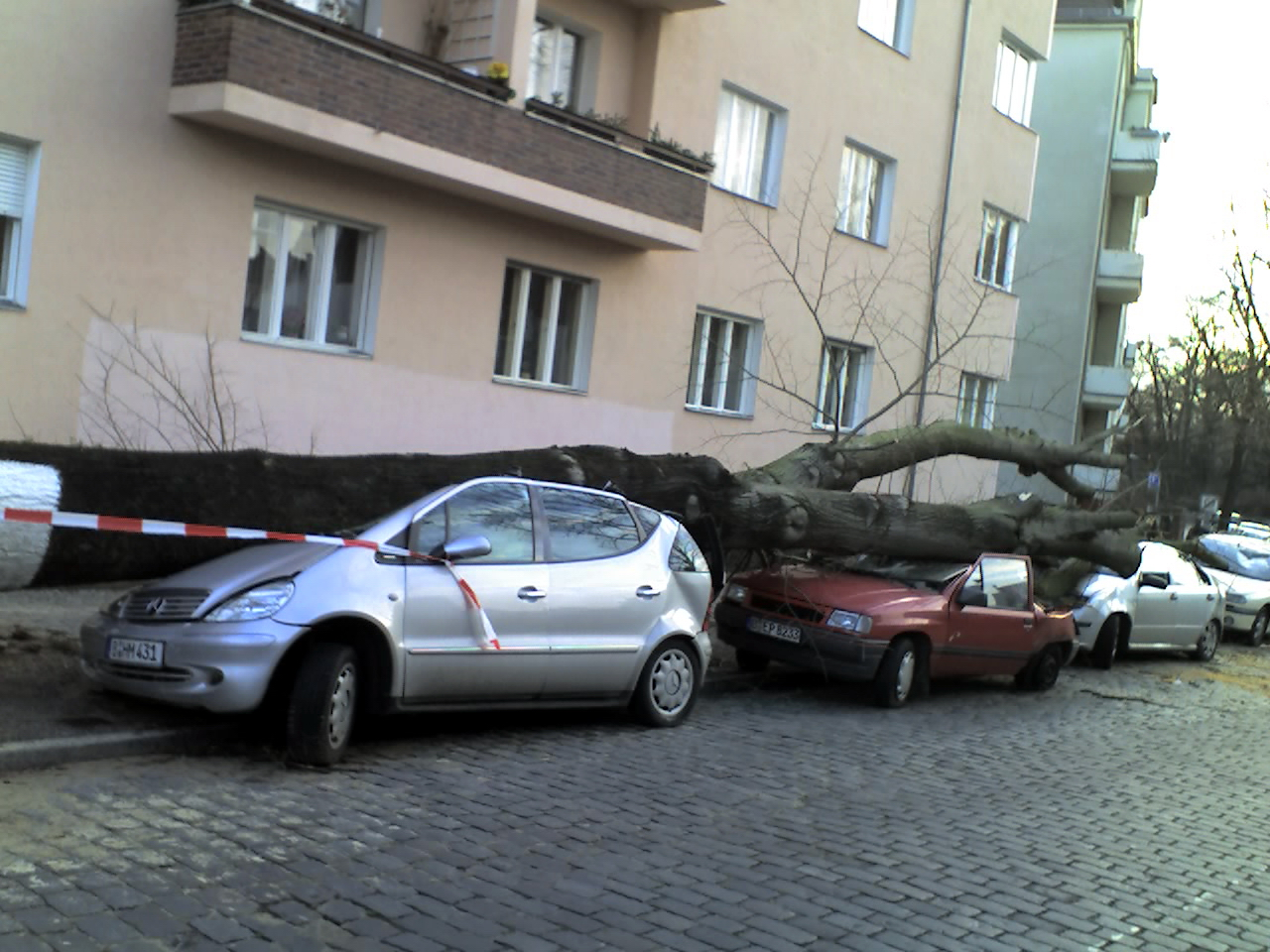 Sturmschaden durch den Orkan Kyrill 2007 in Berlin-Lichterfelde